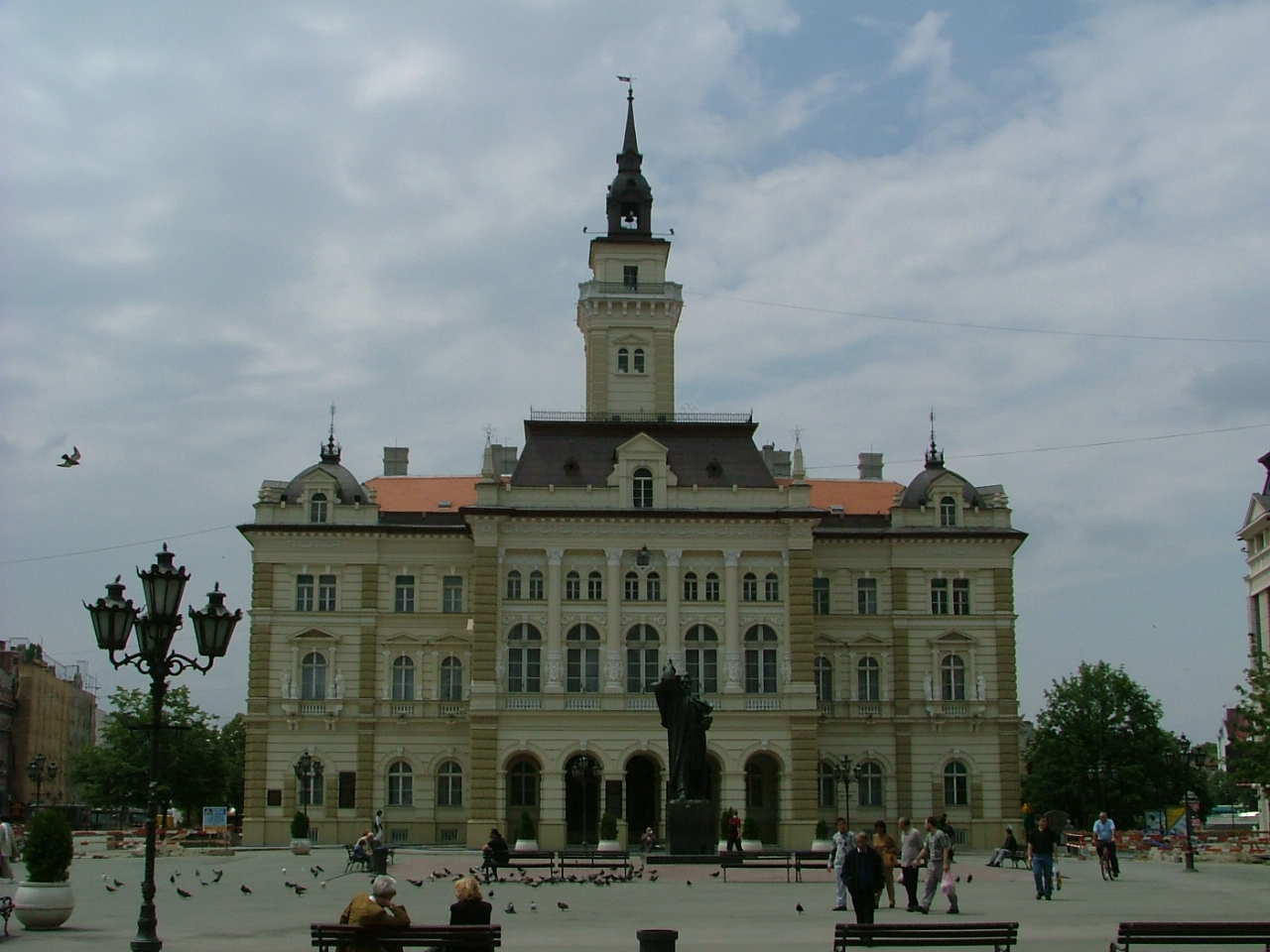 Városháza Újvidéken (Szerbia)